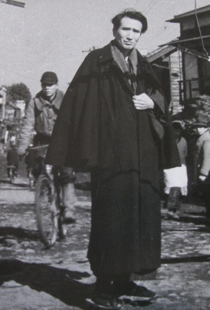 黒マント姿の太宰治